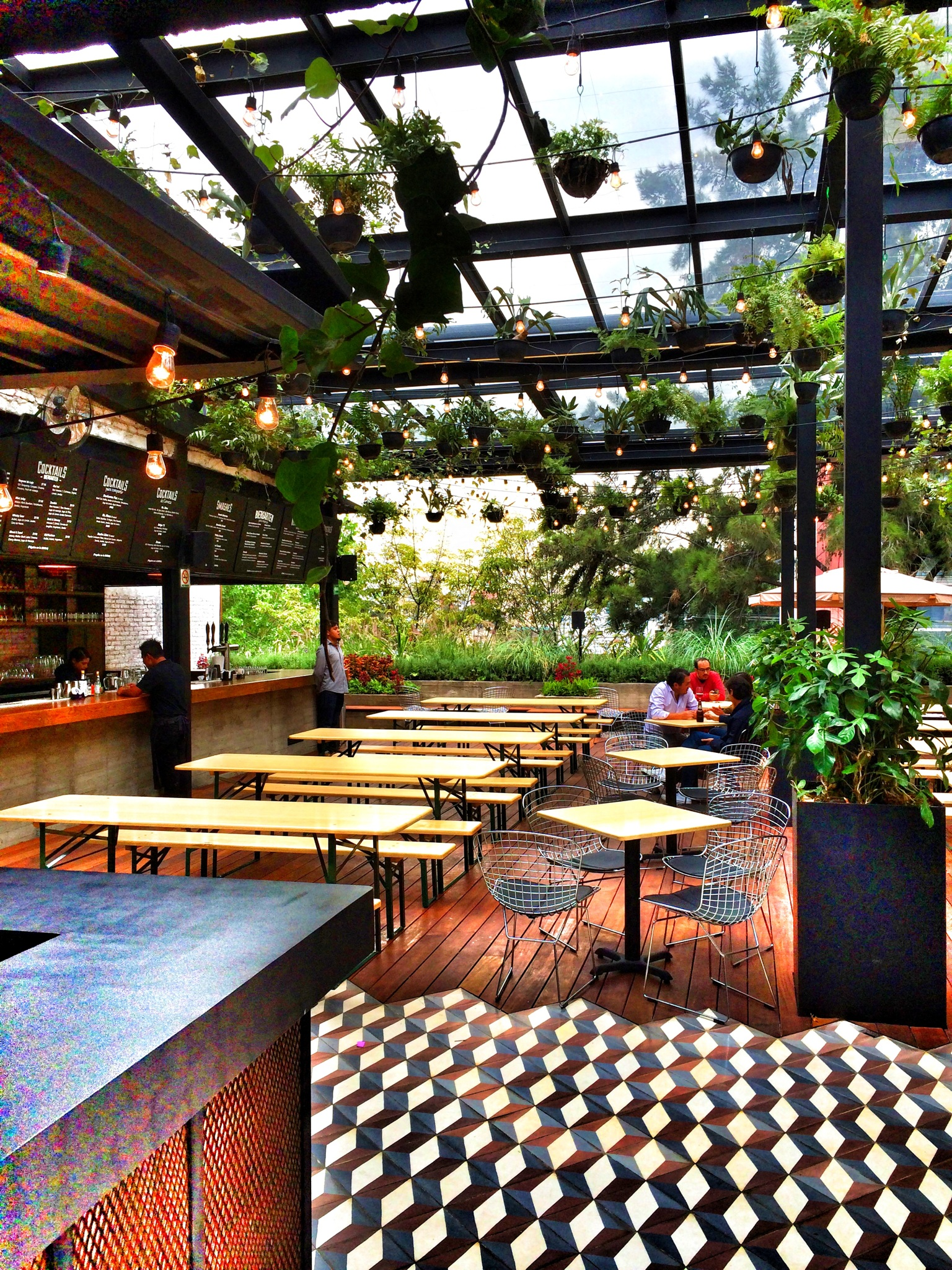 Mercado Roma Biergarten